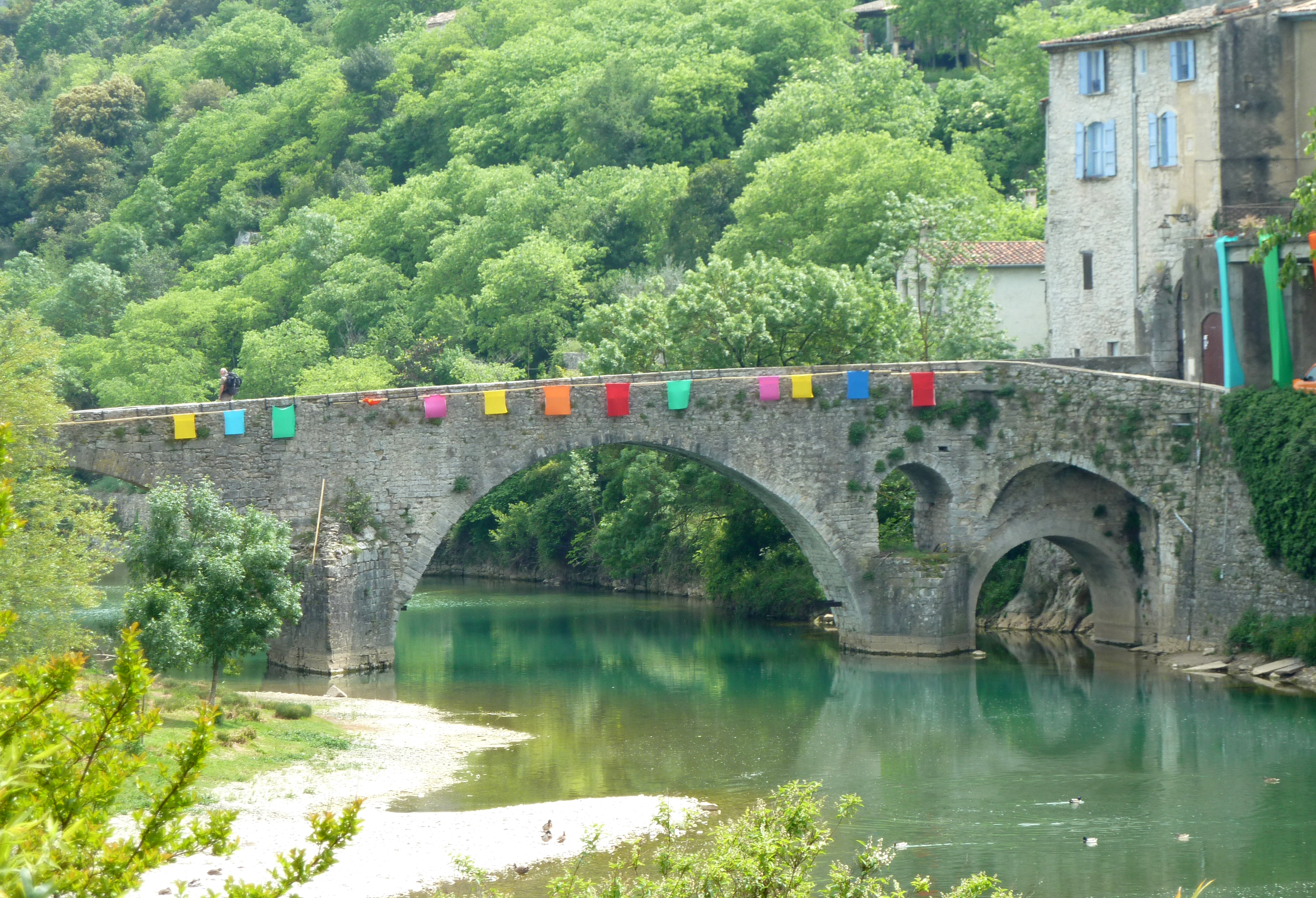 Pont de Sauve, dans le Gard (France), franchissant le Vidourle.